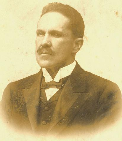 Político colombiano nacido en el municipio Soatá.